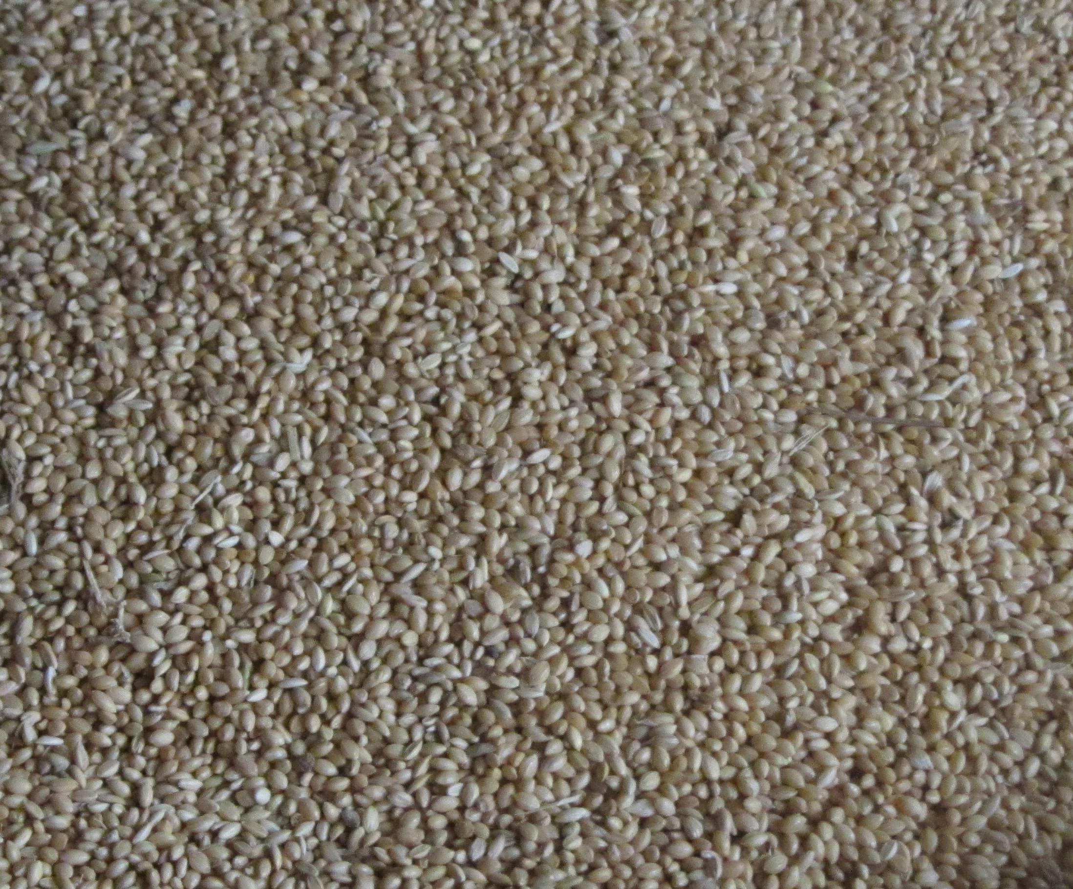 தினை, - இது வானம் பார்த்த பயிர். தினைப்புனம் காத்தல் குறிஞ்சிநில மகளிரின் சொழில். தினைக்கதிர் நரியின் வால் போல் இருக்கும்.